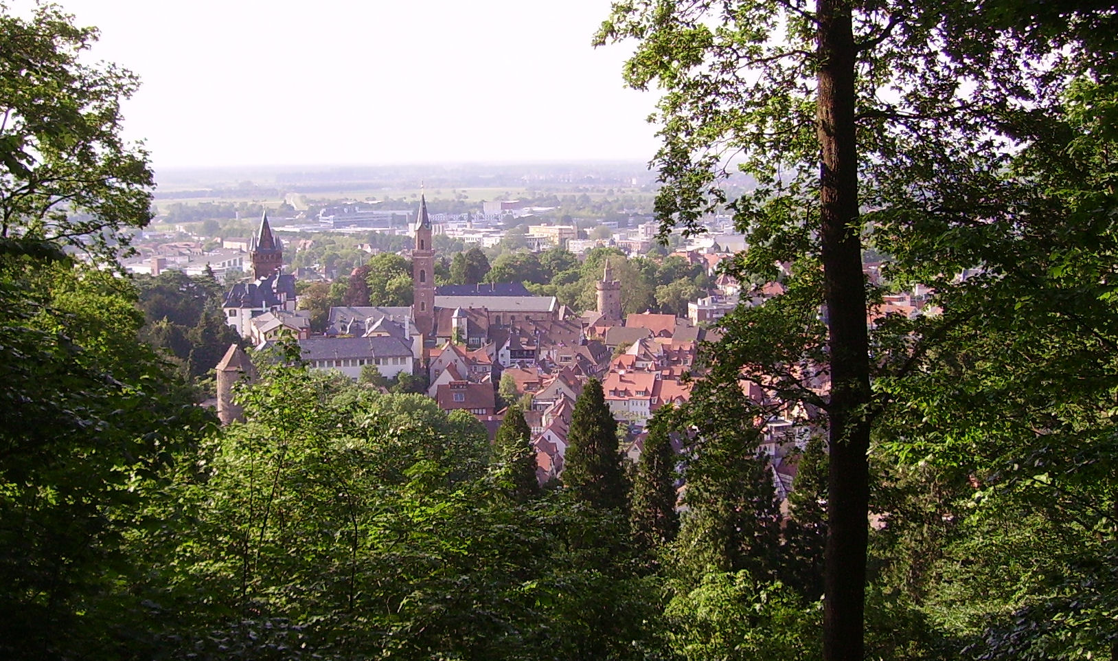 view of Weinheim, Germany